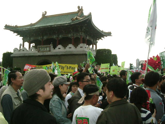 2005年三二六護臺灣大遊行，攝於臺北市東門圓環。